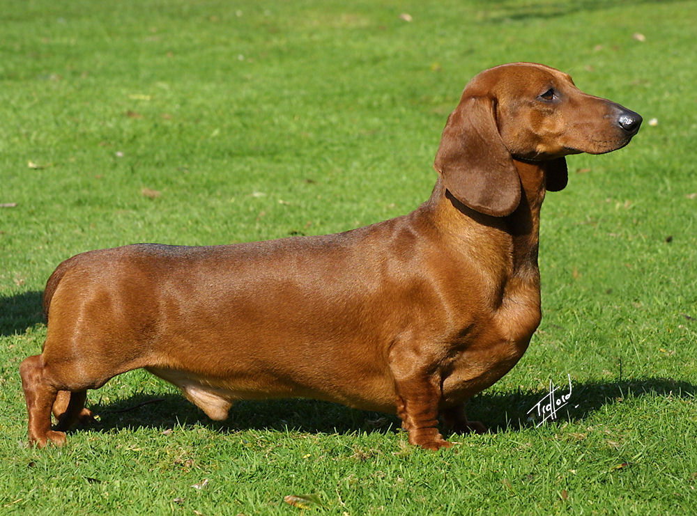 такса стандартная гладкошерстная